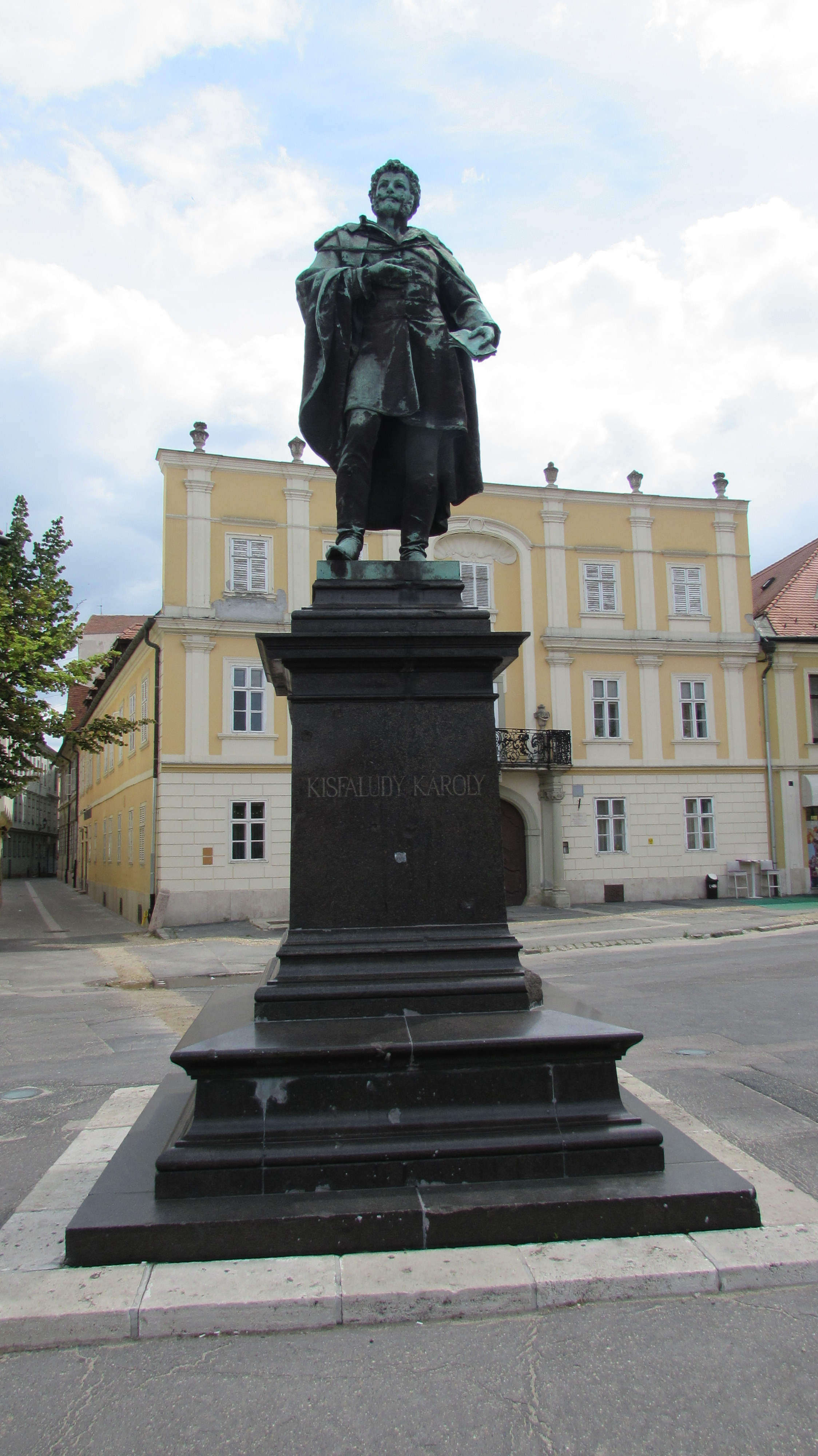 Karoly Kisfaludy Györ